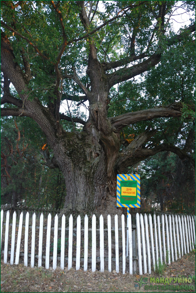 Дуб черешчатий, Котелевський р-н, с. Деревки, територія кладовища